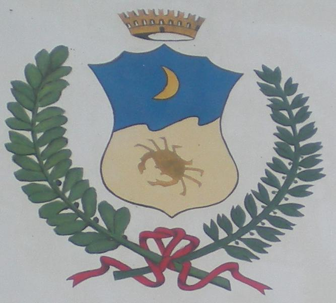 Stemma di Bivona